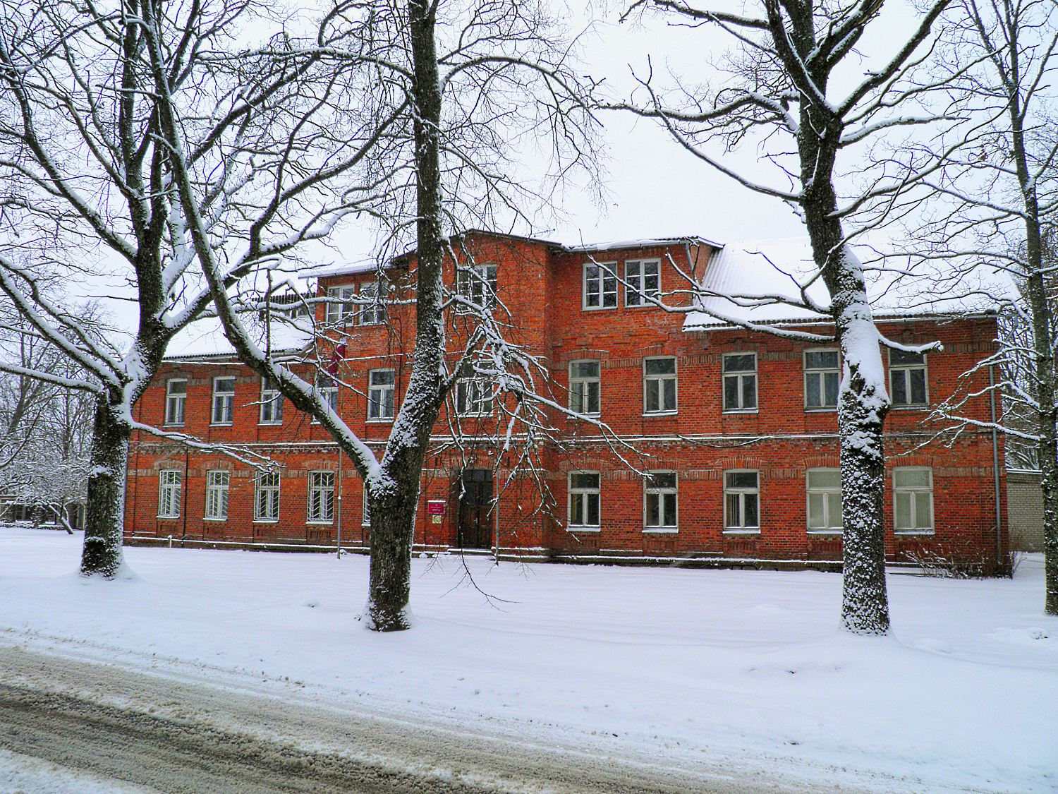 Limbažu pagasta pārvalde